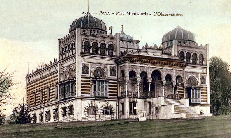 Palais du Bardo - Paris, Parc Montsouris (France) ; carte postale